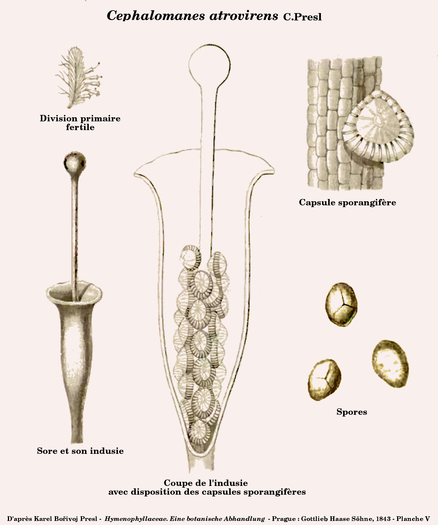 Cephalomanes atrovirens C.Presl - Schéma issu de Hymenophyllaceae de C. Presl (1843) retravaillé sous Gimp (D. Prévôt)